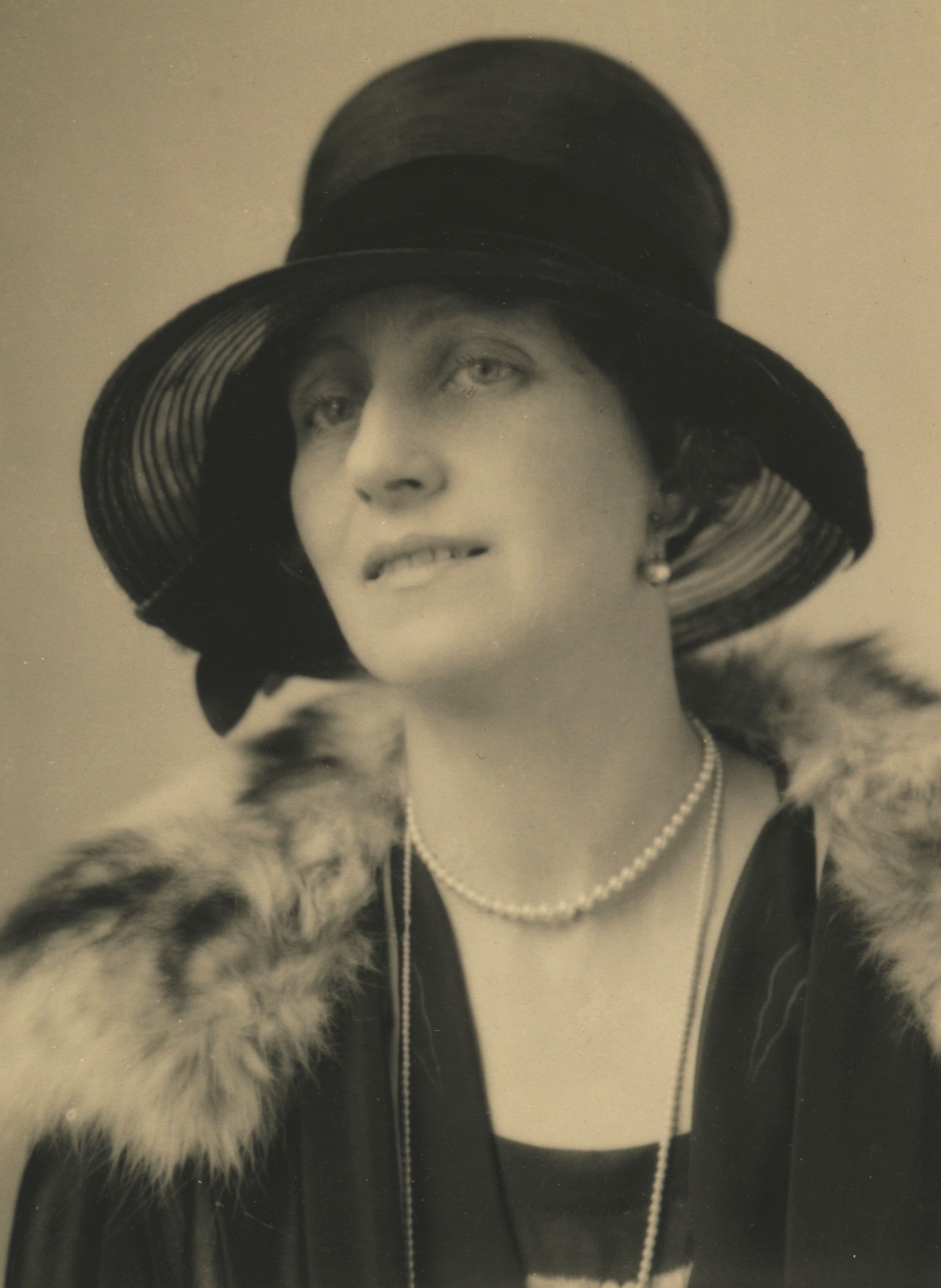 Mabel V. Irvine. Med dedikasjon. Depicted person: Irvine, Mabel V. Depicted place: Storbritannia, London